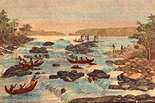 Piroguiers Busi-Nenge sur le Maroni